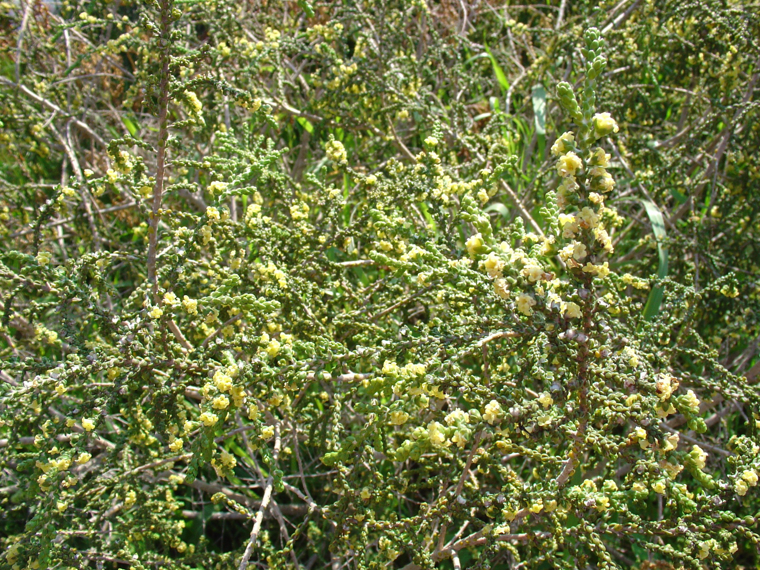 Thymelaea hirsuta procedente de margen de camino en Sierra Minera, Murcia, Spain